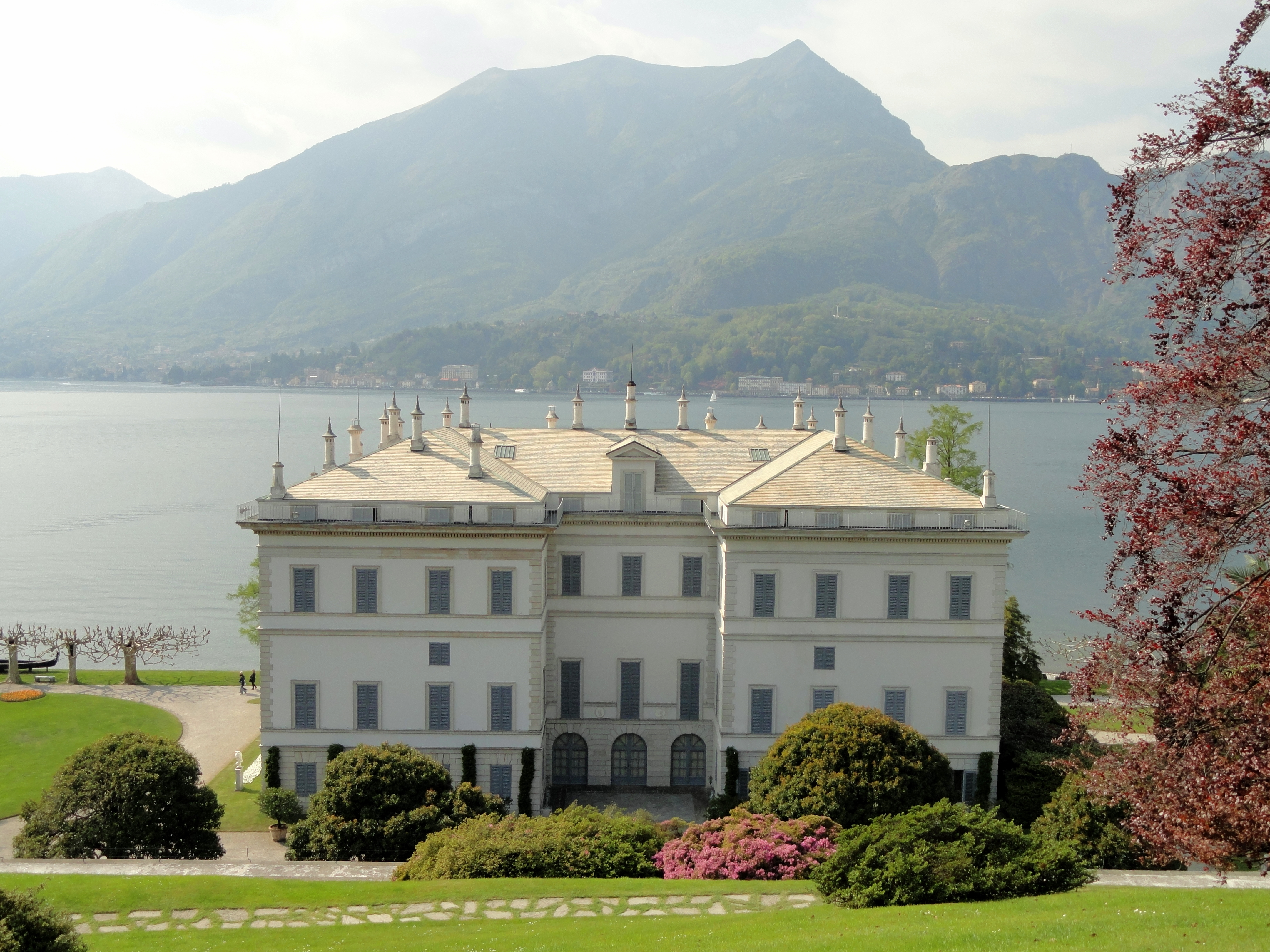 Villa Melzi (Bellagio), on Lake Como, Italy.